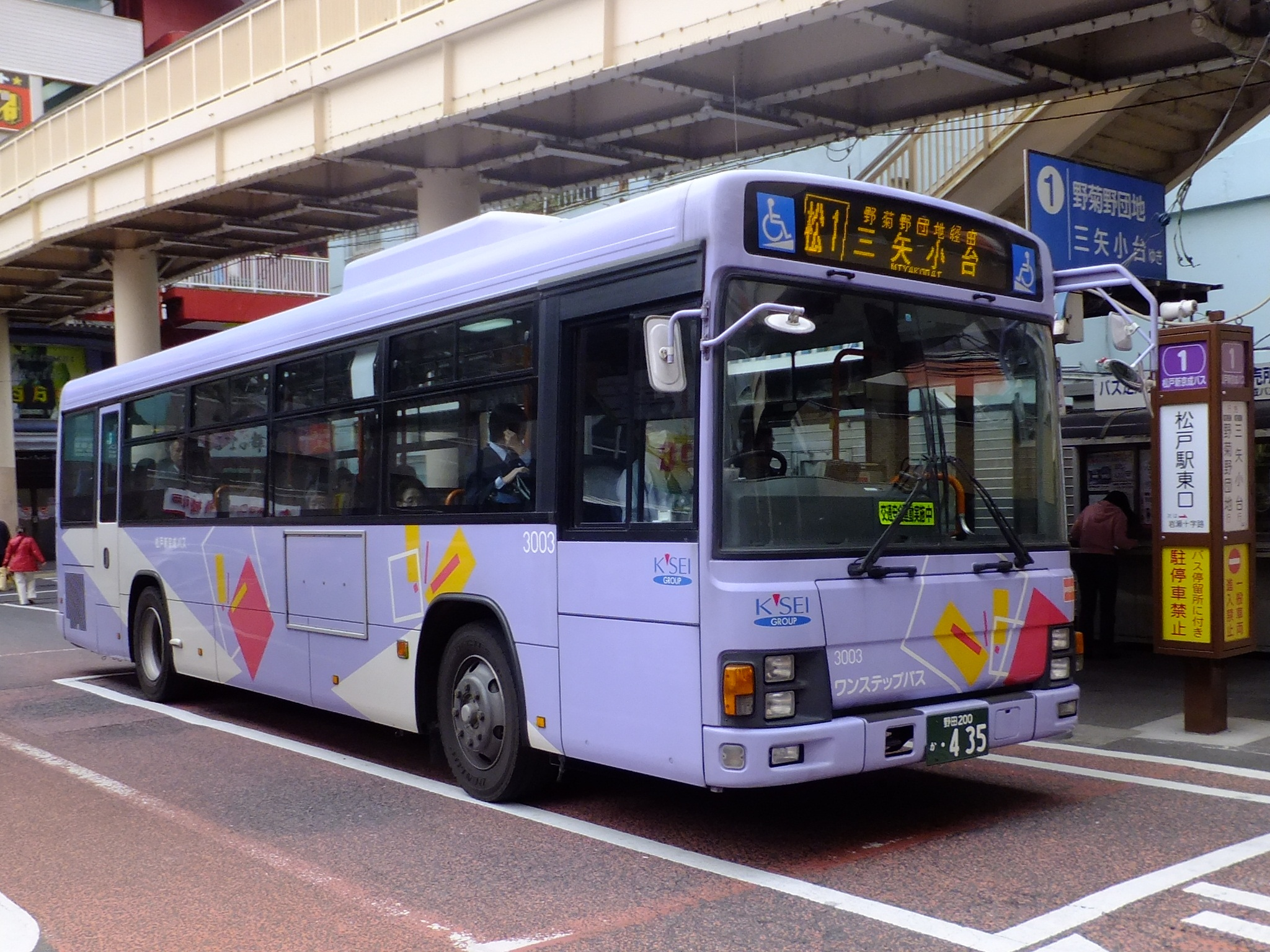 松戸新京成バス3003号車。松戸駅東口バスターミナルにて